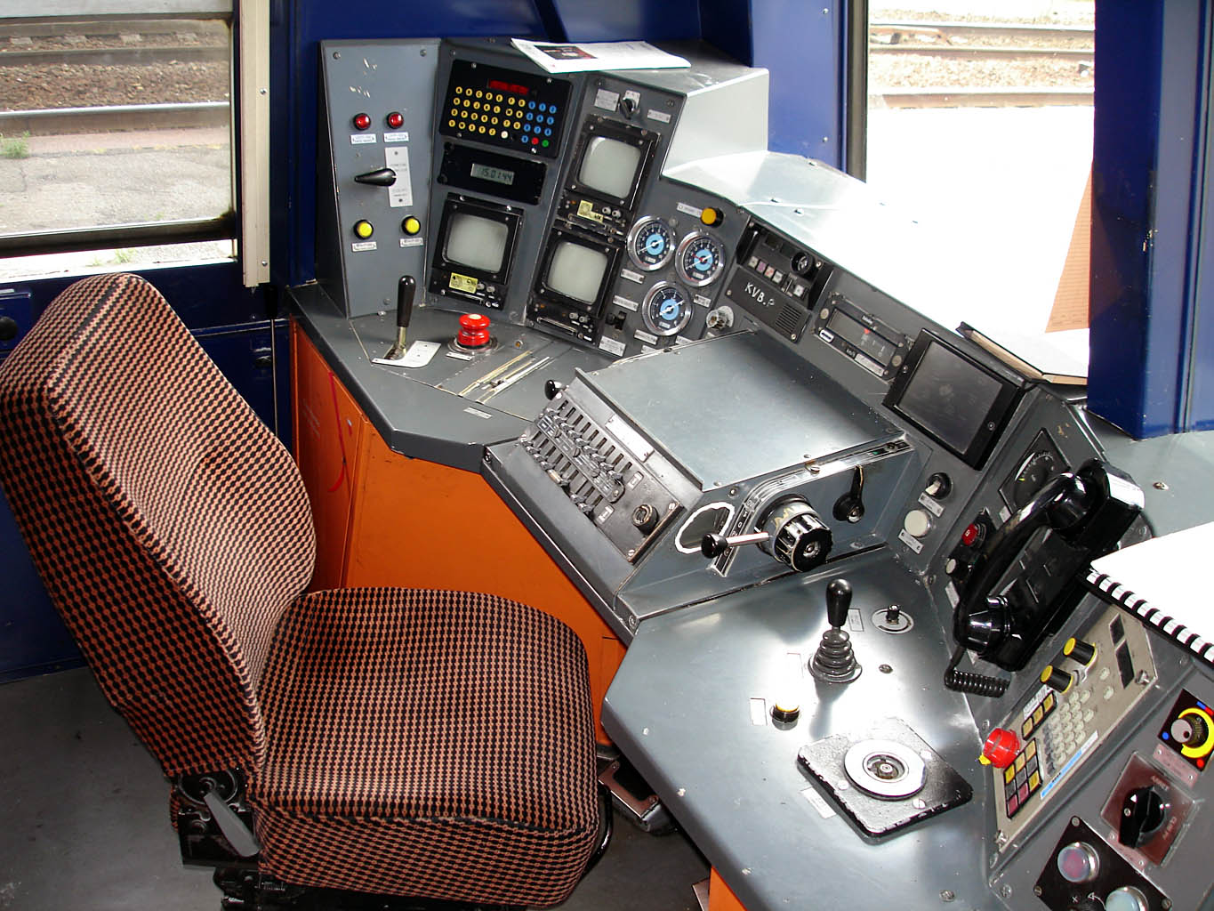 Pupitre de conduite d'une rame Z 20500.